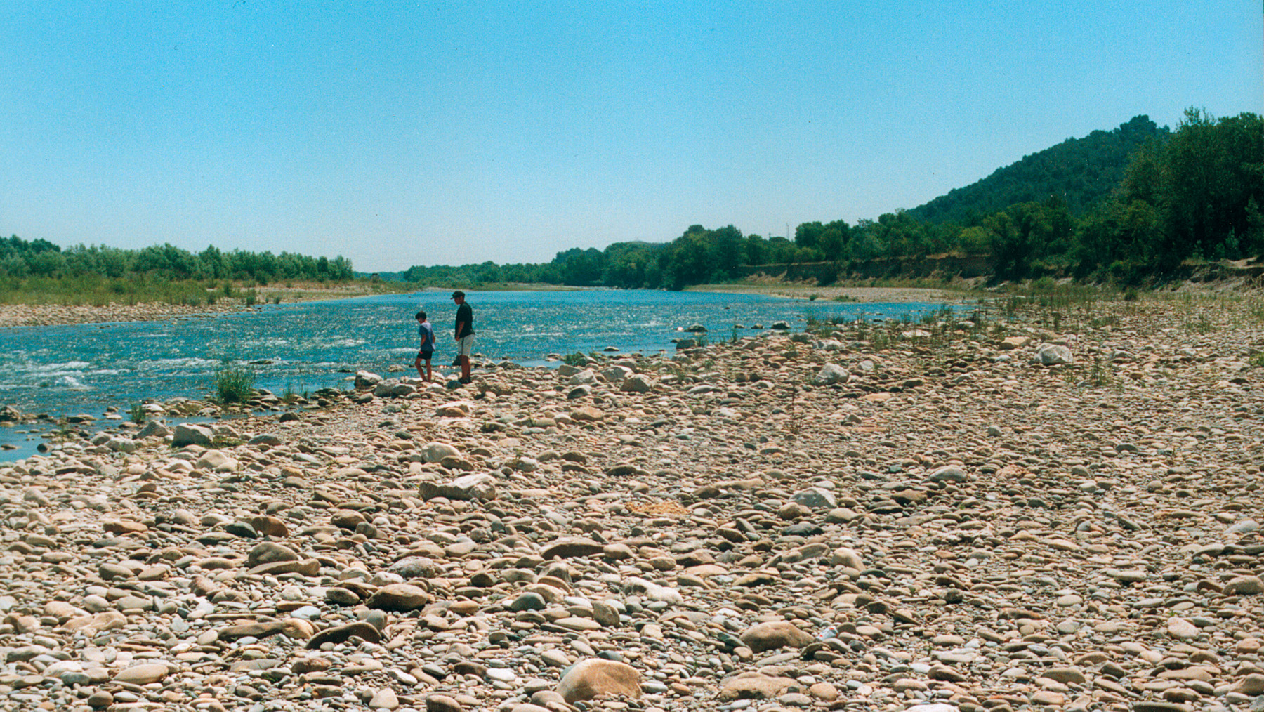 Die Durance im Departement Vaucluse; Foto: N. Selisky